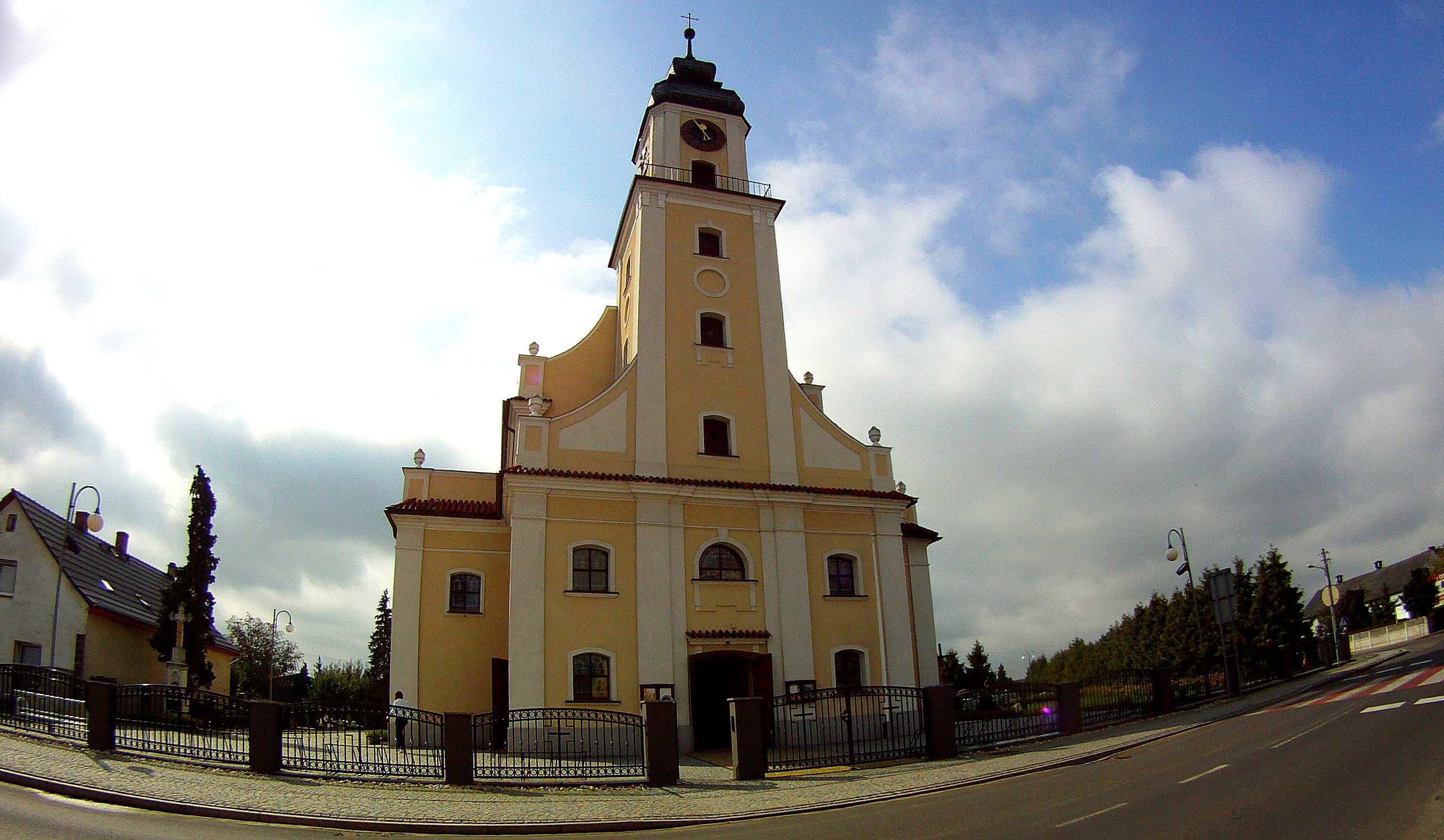 Chróścice - kościół parafialny pw. św. Jadwigi, 1936-1937